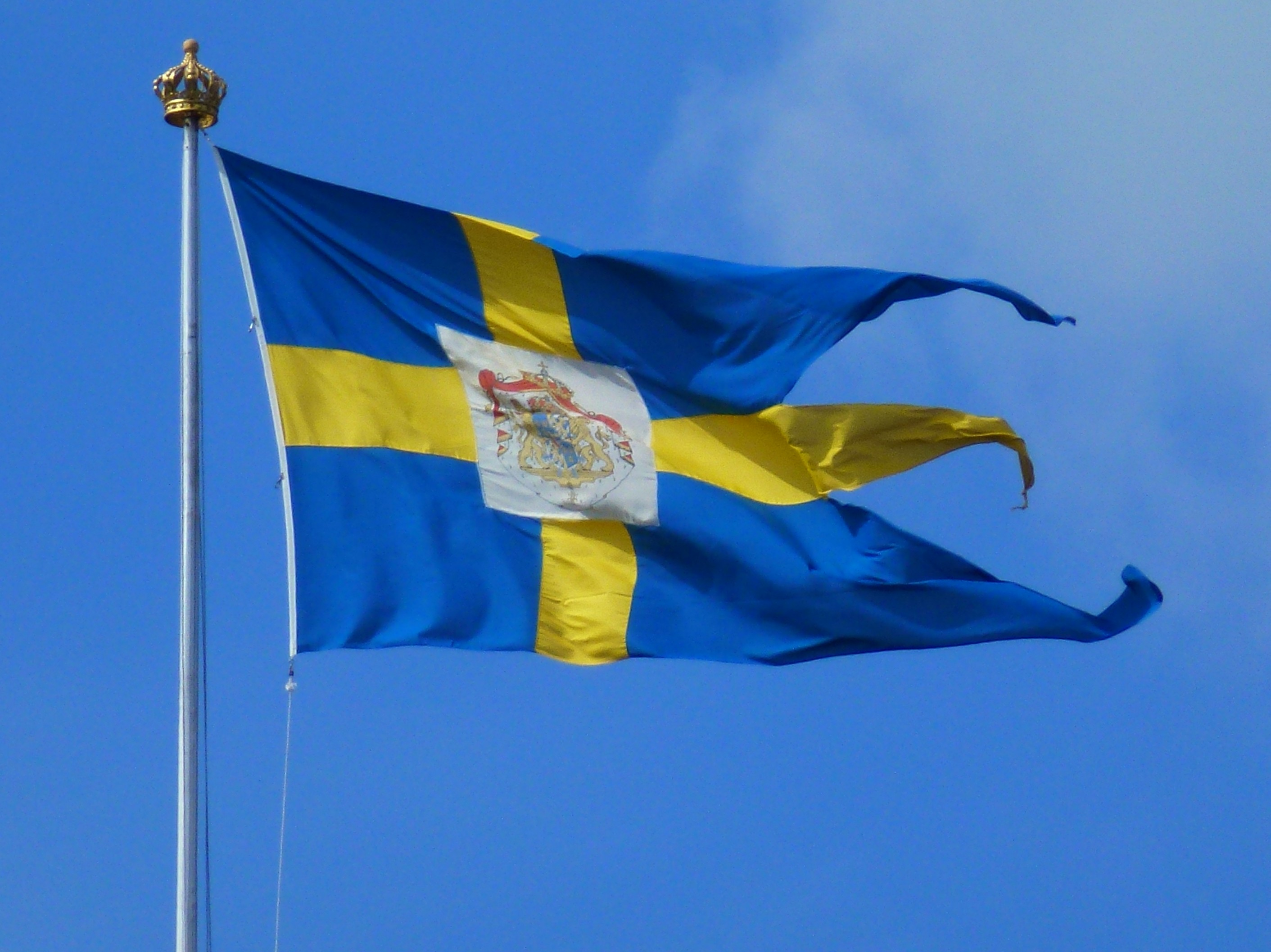 Ulriksdals slott, kungaflaggan uppe